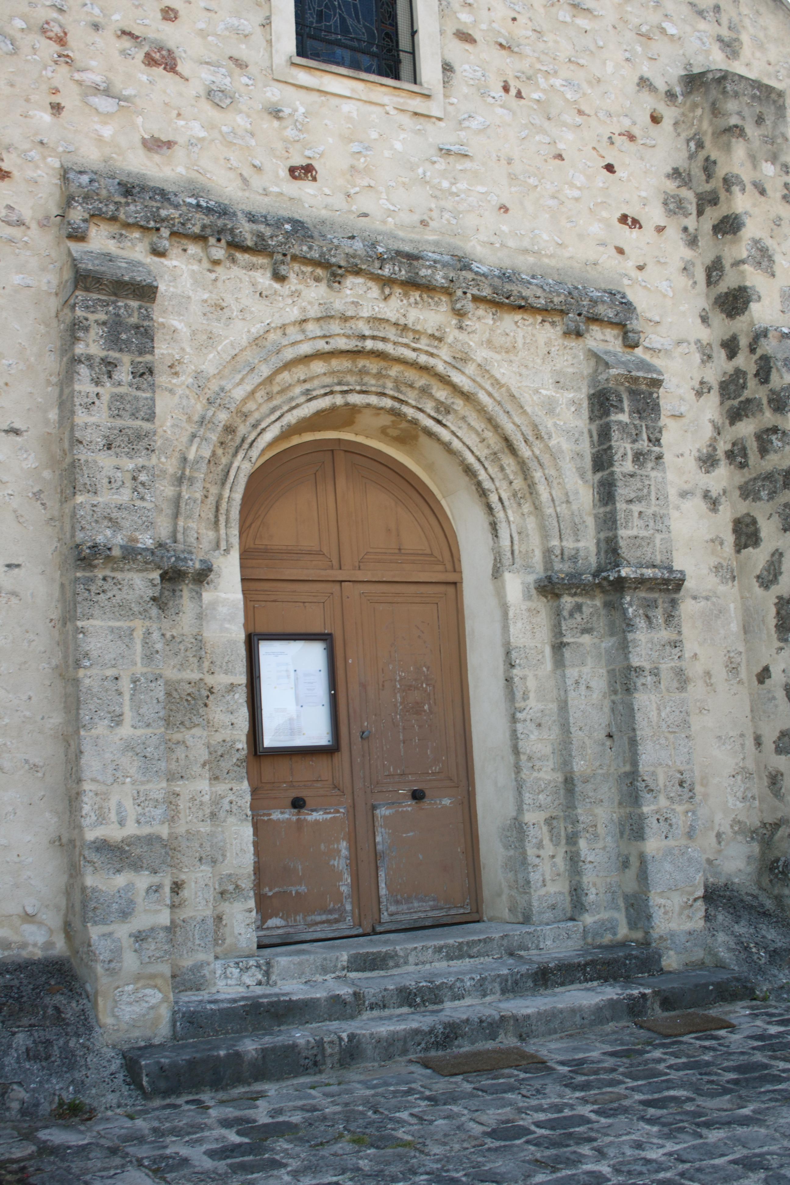 Kirche Saint-Mammès in Saint-Mammès im Département Seine-et-Marne (Île-de-France)